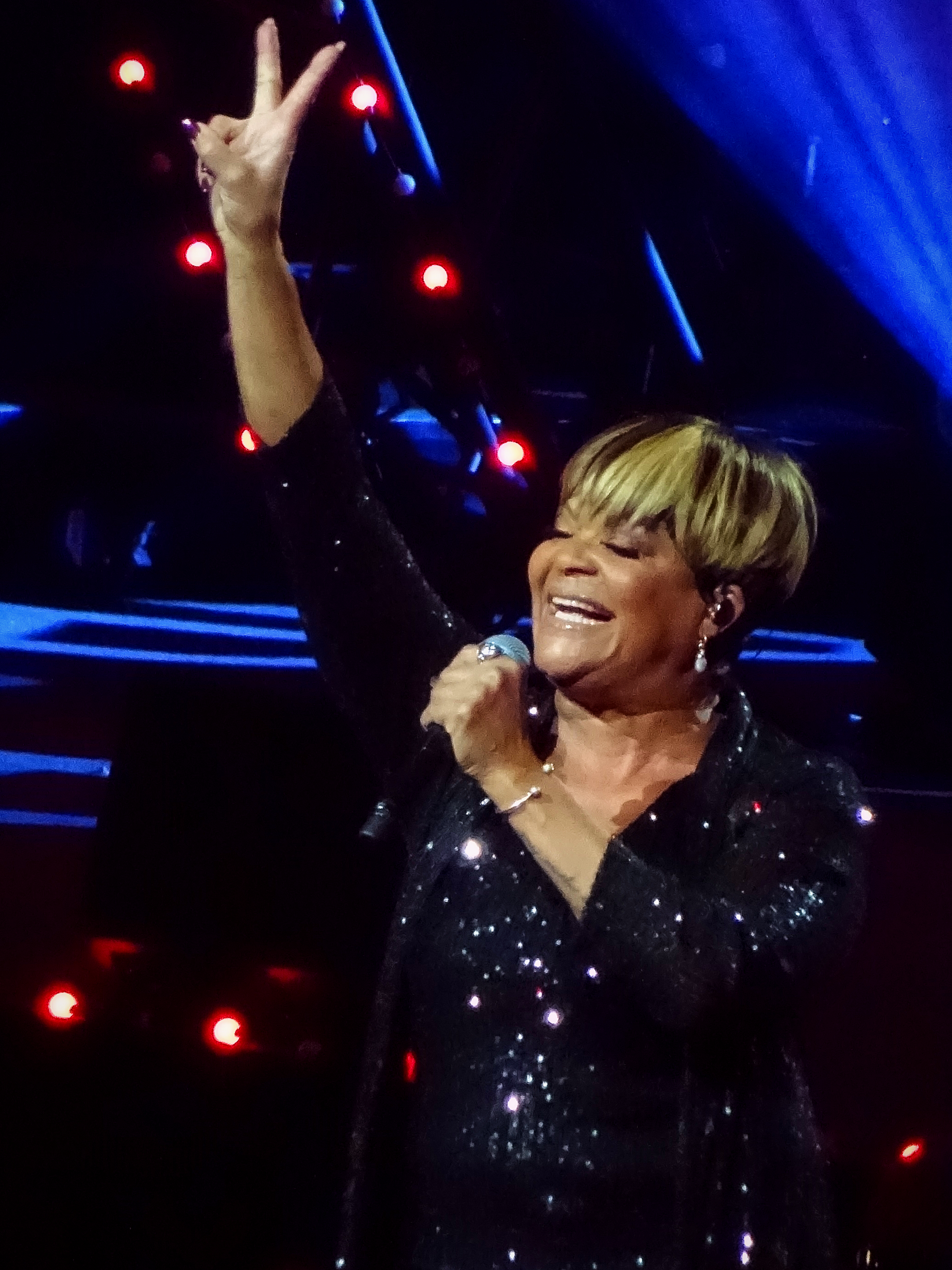 Ruth Jacott tijdens Het Grote Songfestivalfeest